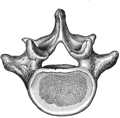 A lumbar vertebra from above.